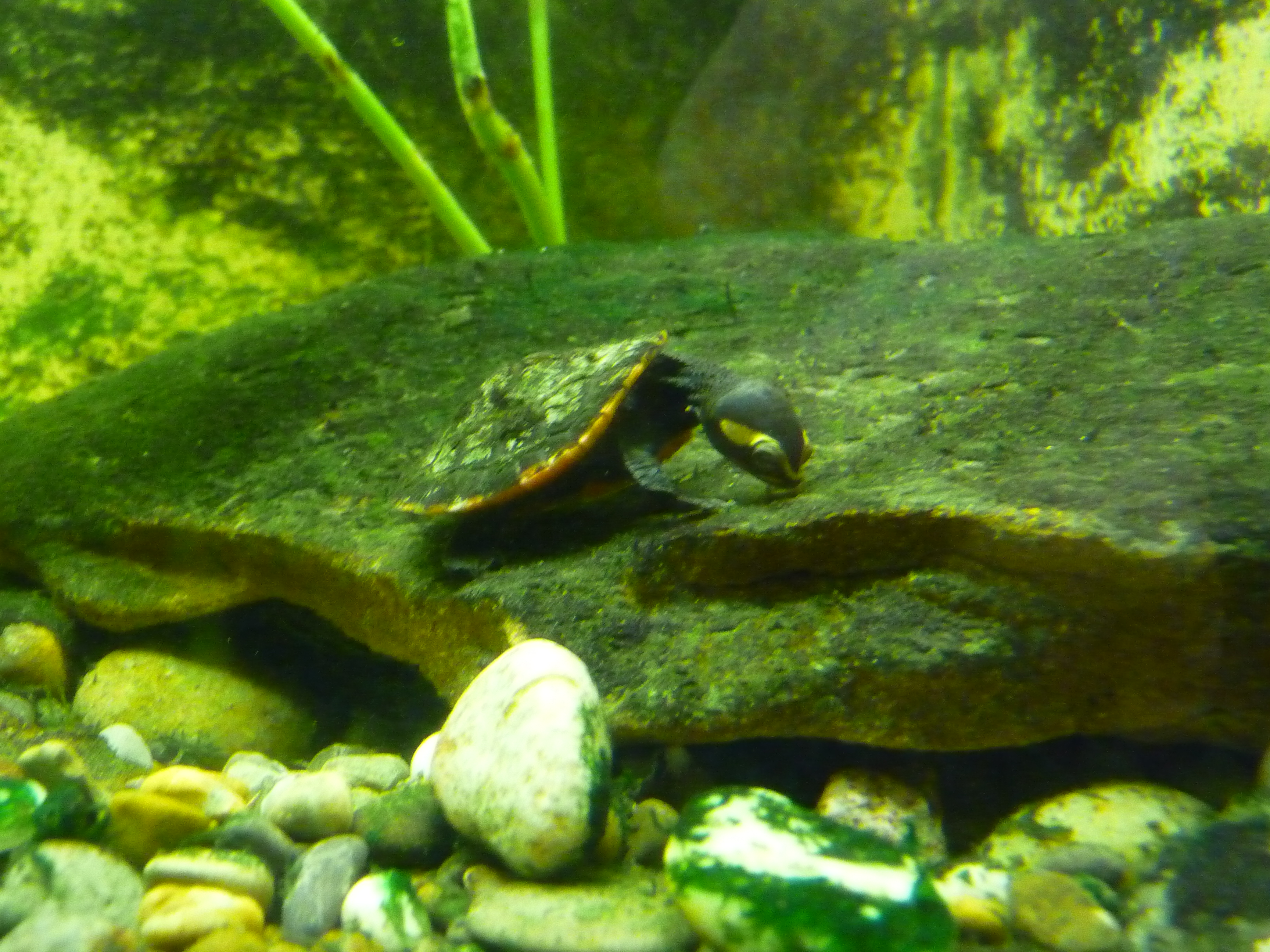 Junge Rotbauch-Spitzkopfschildkröte (Emydura subglobosa) im Vivarium Darmstadt (Hessen, Deutschland)